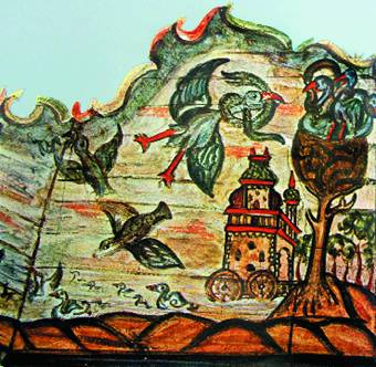 Один из фрагментов росписи могилевской синагоги. Древо Познания с гнездом, к которому летит аист, несущий змею. Около Древа – архитектурная конструкция в виде башни на колесах: изображение библейского ковчега Завета на пути в Иерусалим. Аисты на Древе Познания символизируют подлинных праведников, которые способны победить змей, то есть сатанинские силы. Символ основан на созвучии слов «хасид» («праведник») и «хасида» («аист») на языке иврит (рисунок Эля Лисицкого)